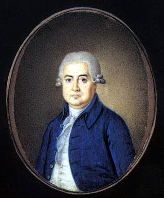 Пётр Алексеевич Татищев (художник Василий Тропинин)